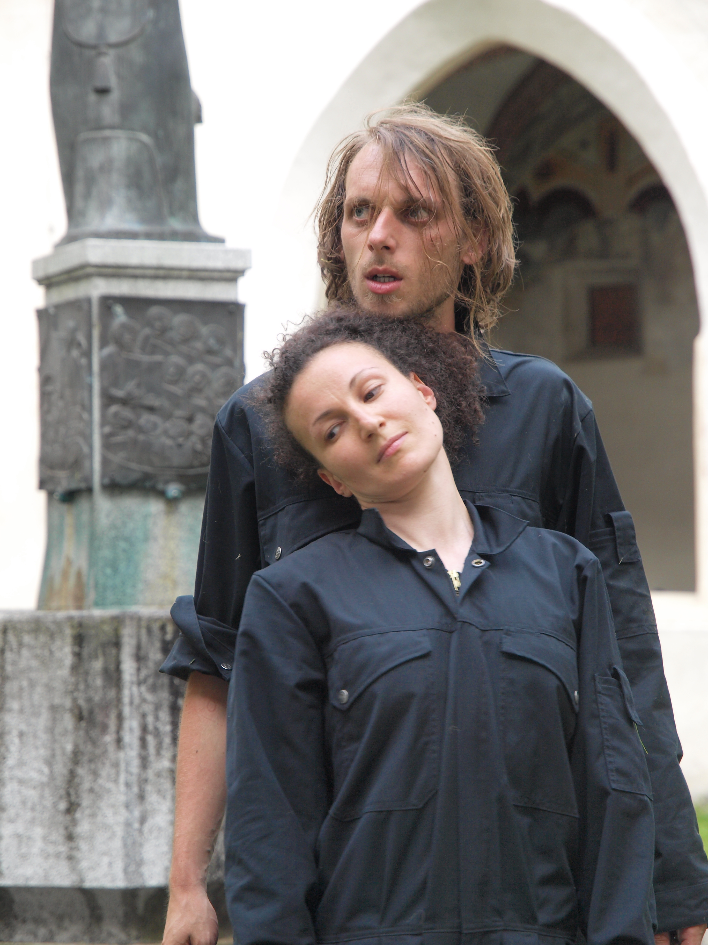 Szenenfoto aus "Wer ohne Sünde ist ..." des TheaterStudios Freitag aufgeführt im Rahmen des Internationalen Amateurtheaterfestivals dialog.in - Elfi Troi und Markus Prieth